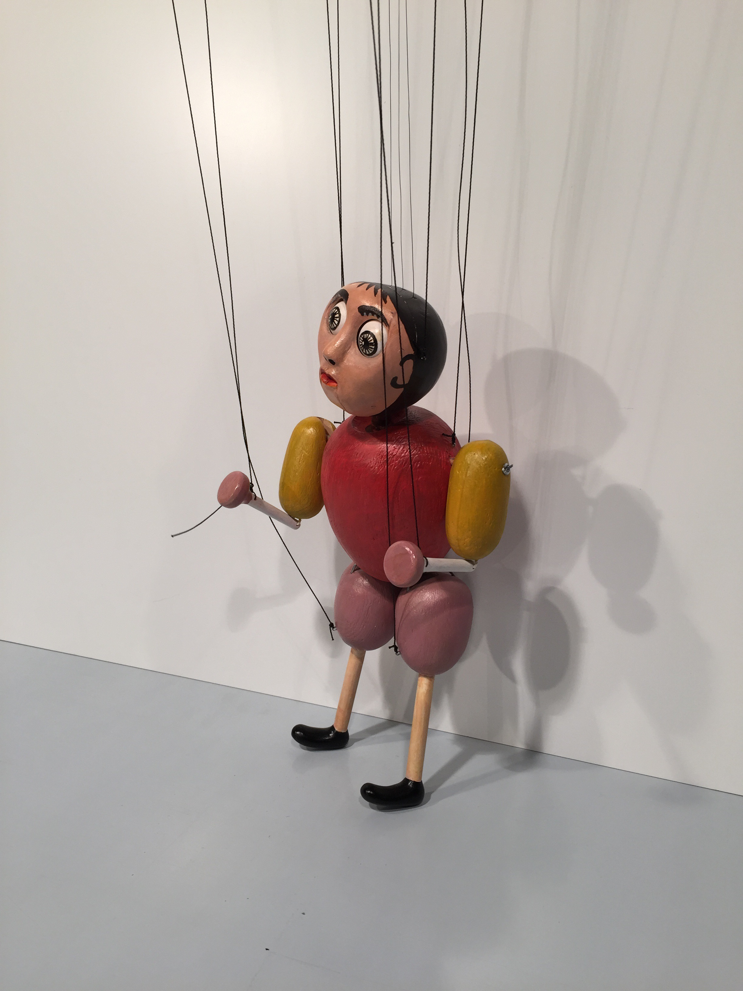 Nachbau (2015) der am Bauhaus gefertigten Marionette "Der Bucklige". Original Gestaltung von Kurt Schmidt, Ausführung von Toni Hergt, 1923. Seitliche Ansicht.